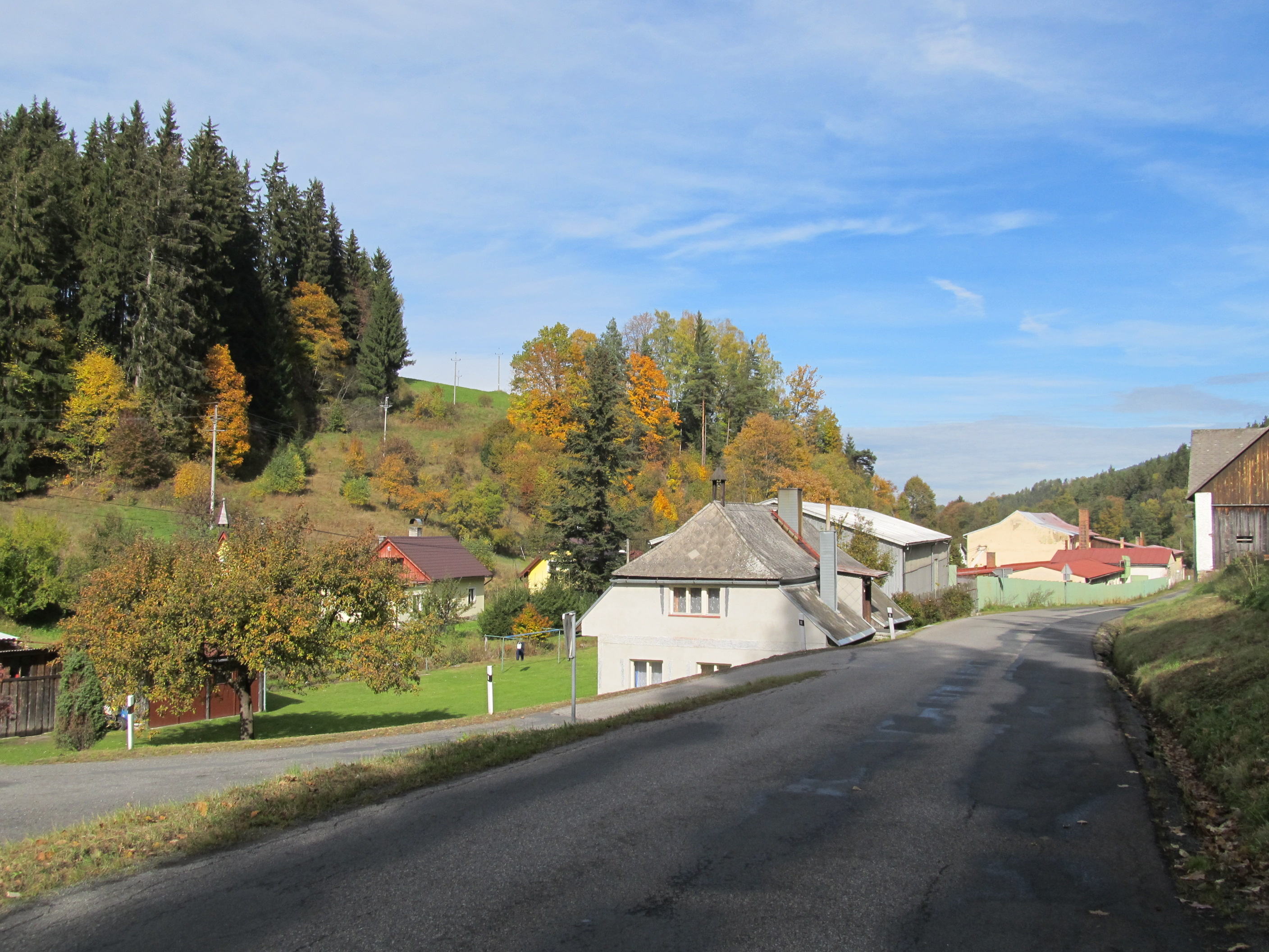 Chlum u Hartmanic